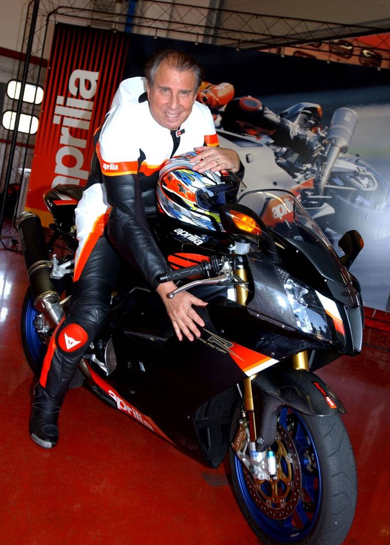 Presntazione RSV al Mugello, 2005